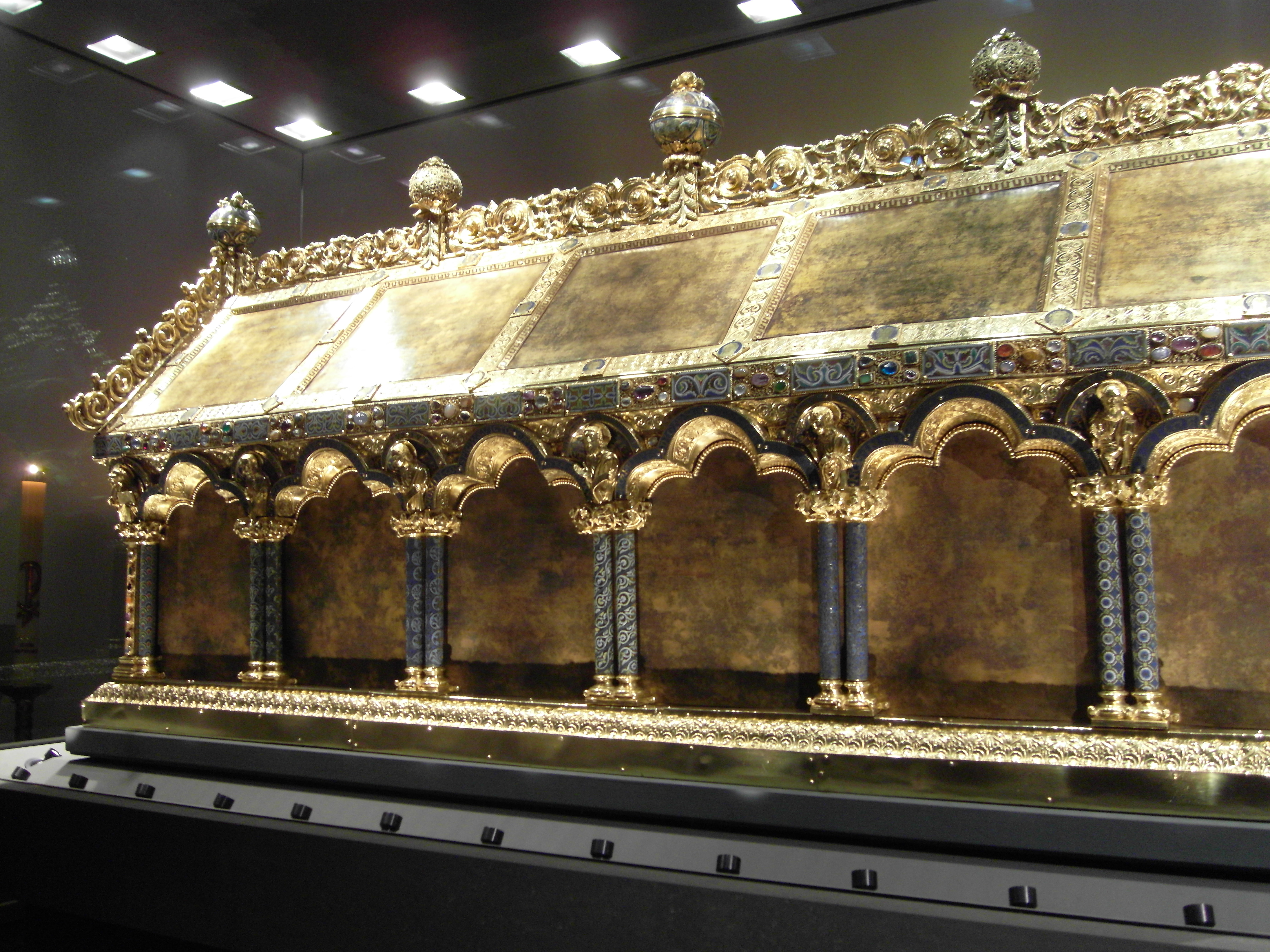 Schrein des Erzbischofs Anno II.